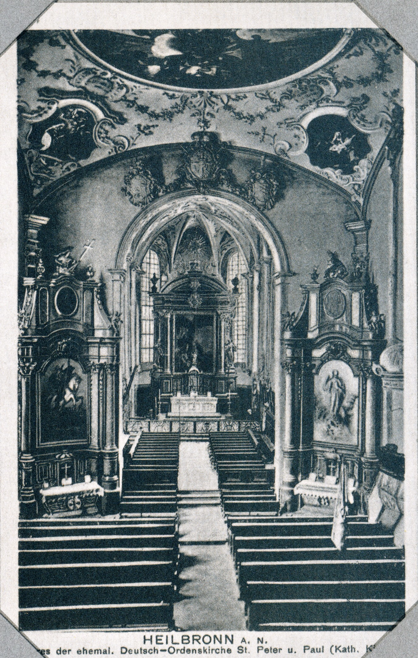 Der Innenraum des Deutschordensmünsters St. Peter und Paul in Heilbronn. Postkarte um 1900